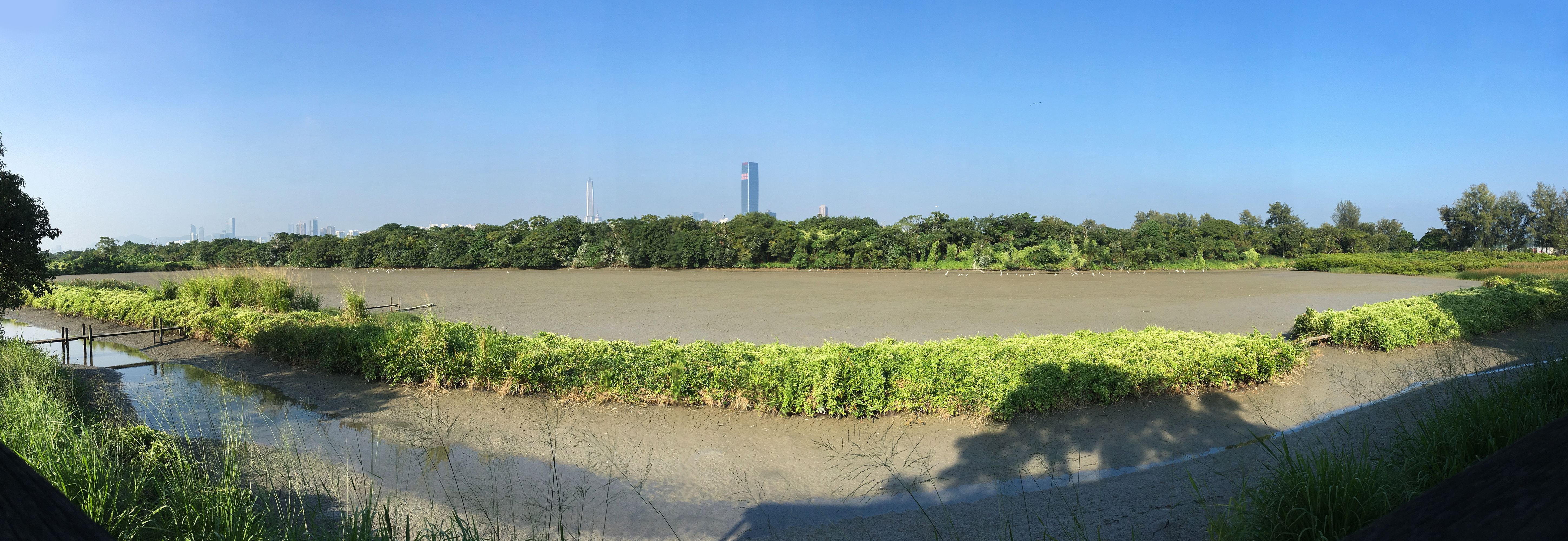 Mai Po Nature Reserve Gei wai pano